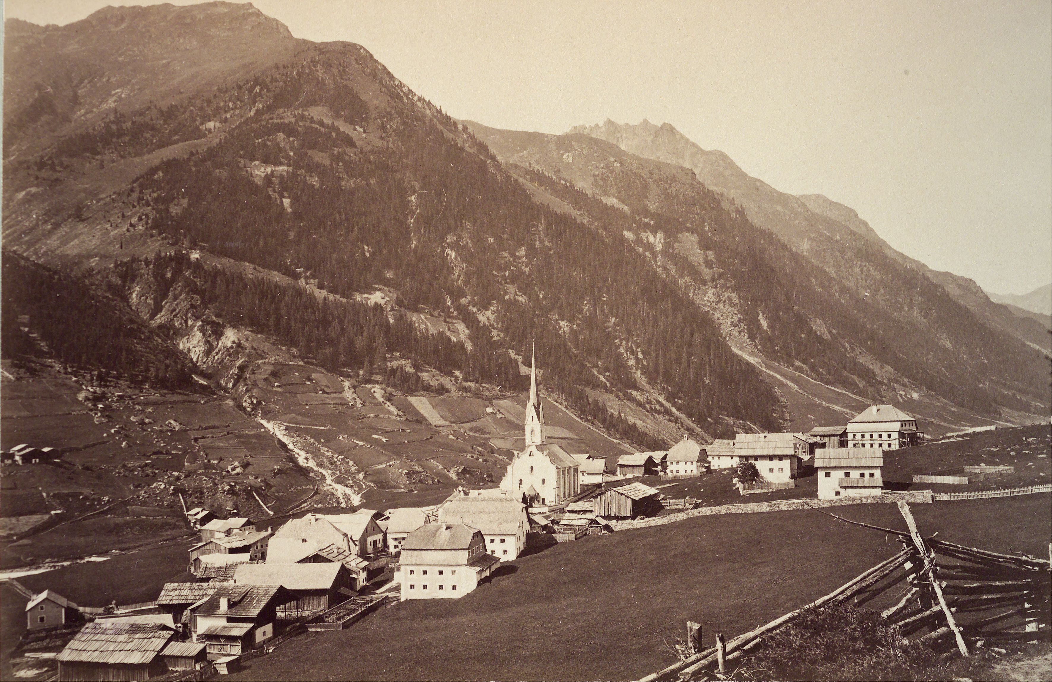 Ischgl um 1890. Fotografie : Albumin-Abzug, auf Karton montiert